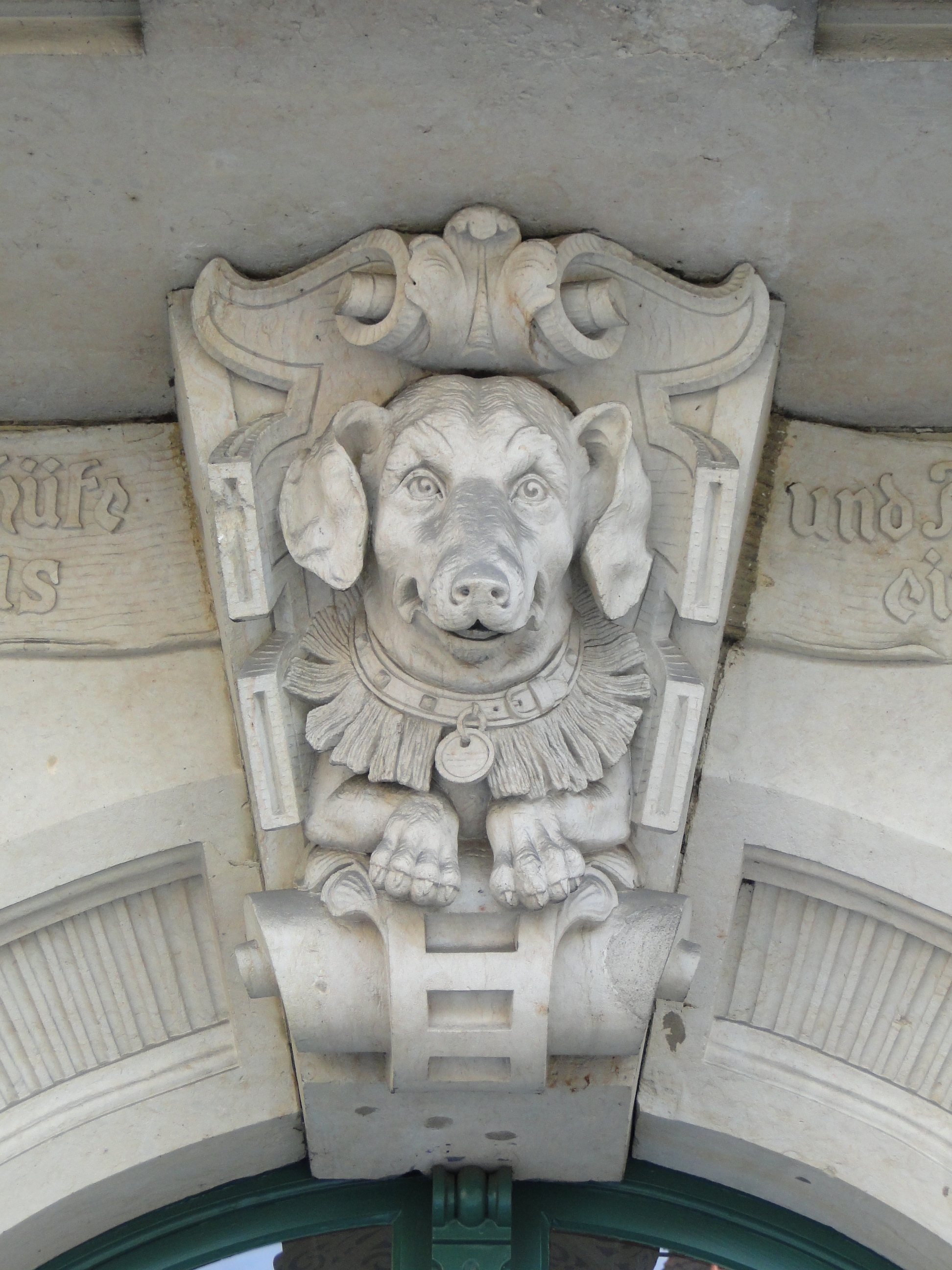 Dackelkopf am Haus Schubert, Loschwitzer Straße 58, in Dresden